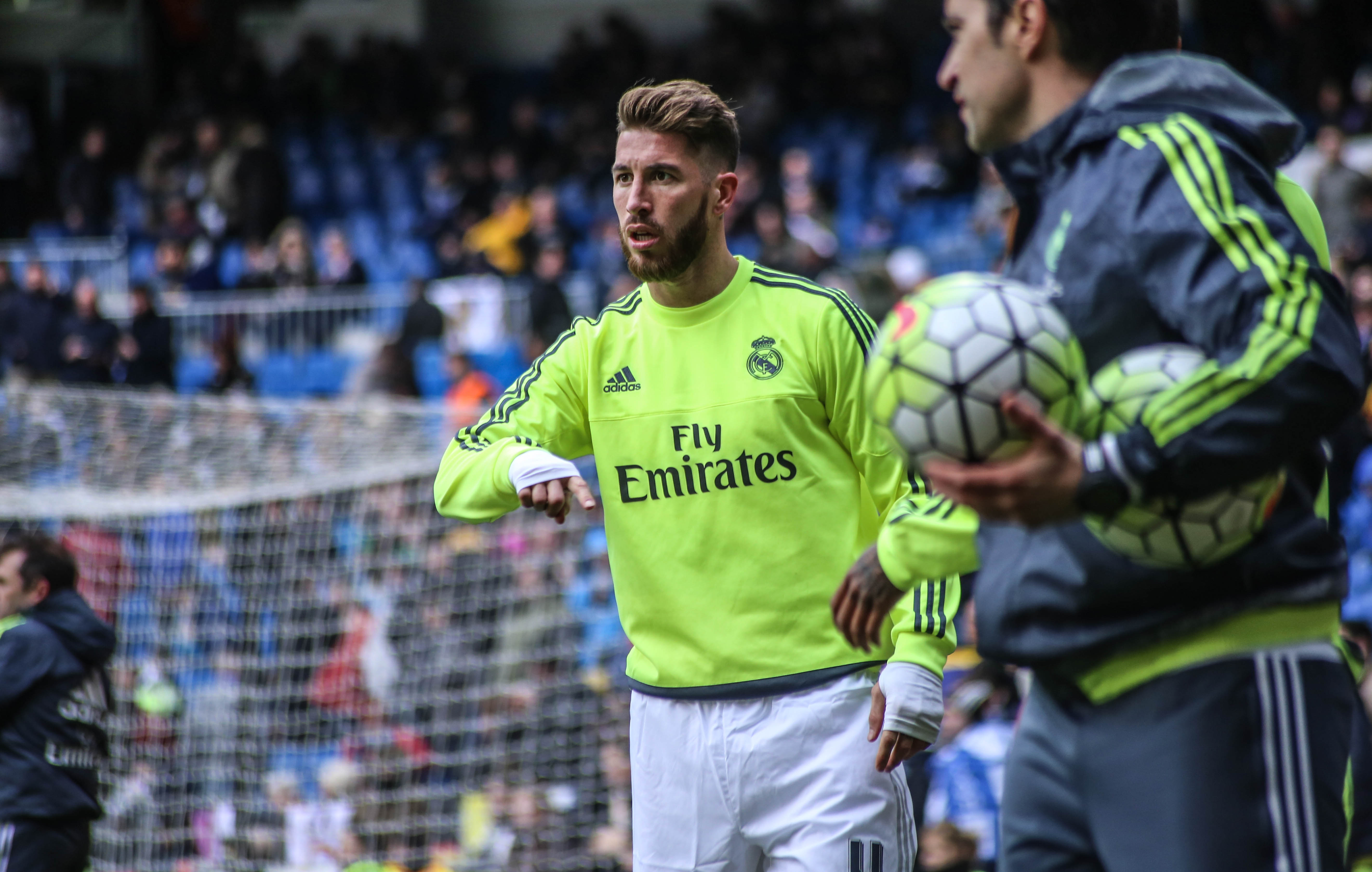 Sergio Ramos entrenando